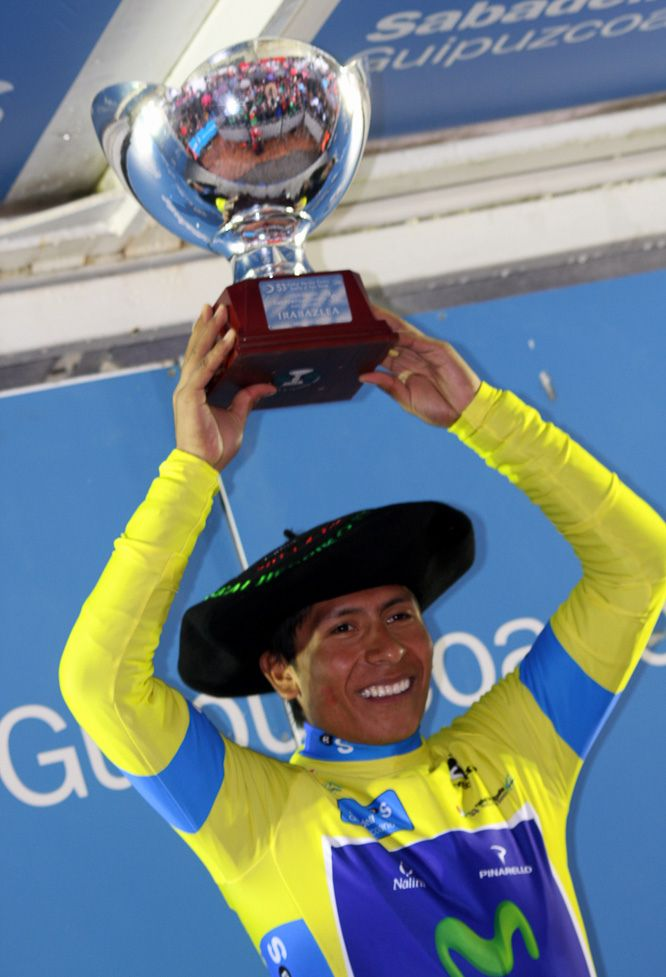 Nairo Quintana, campeón de la Vuelta al País Vasco 2013